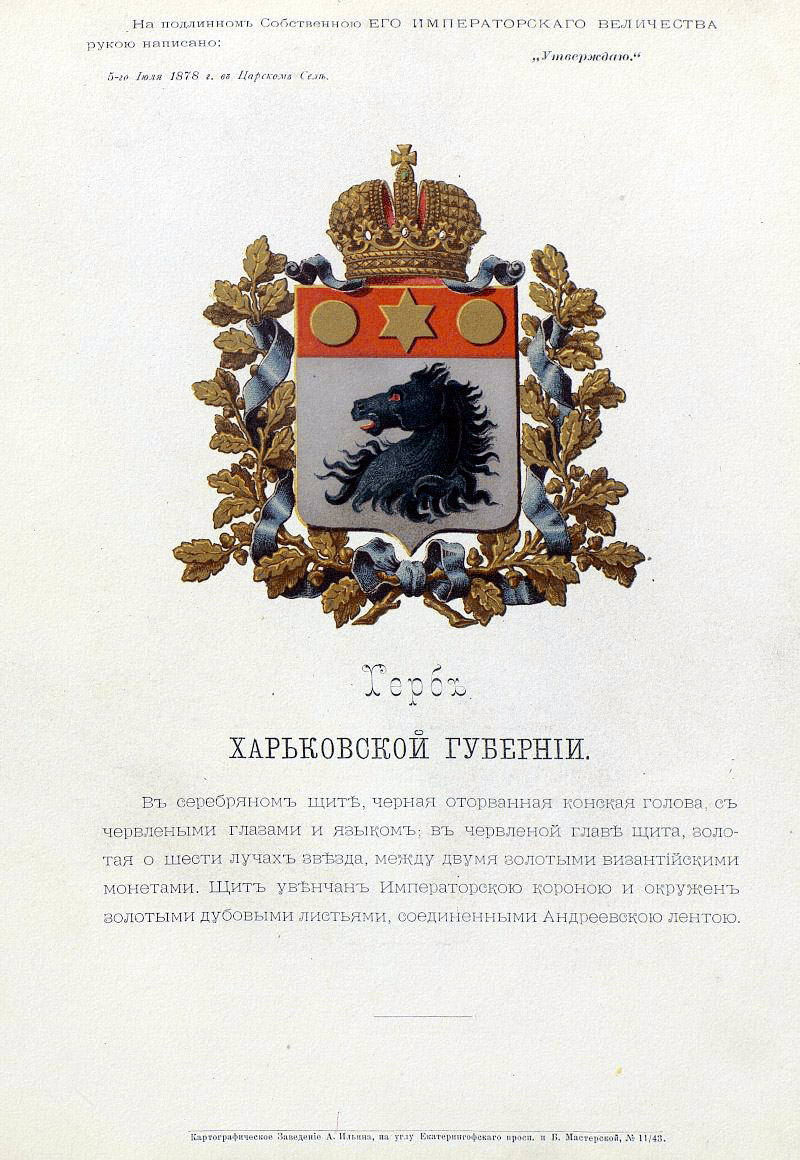 Official Russian Empire coat of arms Kharkov Governorate. Герб Российской Империи Харьковской губернии с официальным описанием в Гербовнике Министерства внутренних дел. Утверждён Императором Всероссийским Александром Вторым.